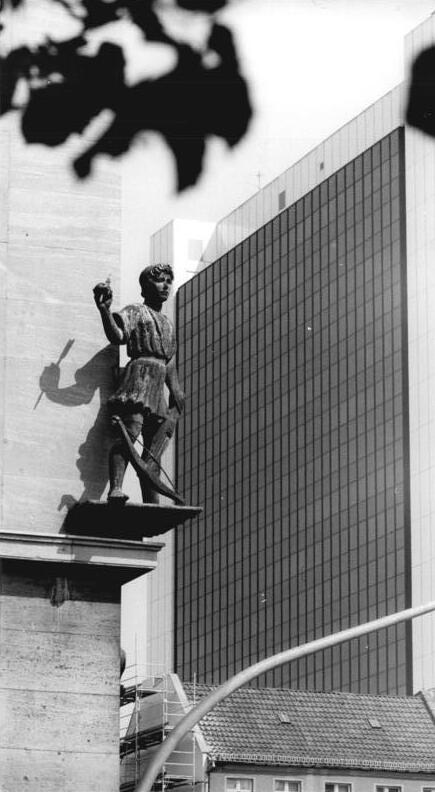 ADN-ZB-Schindler-10. 8. 79-eb-Berlin: Eine so nahe Nachbarschaft besteht in Wirklichkeit nicht zwischen dem bronzenen Tellknaben auf dem Schweizerhaus Ecke Unter den Linden-Friedrichstraße und dem neuen Internationalen Handelszentrum in der Nähe des S-Bahnhofes Friedrichstraße.